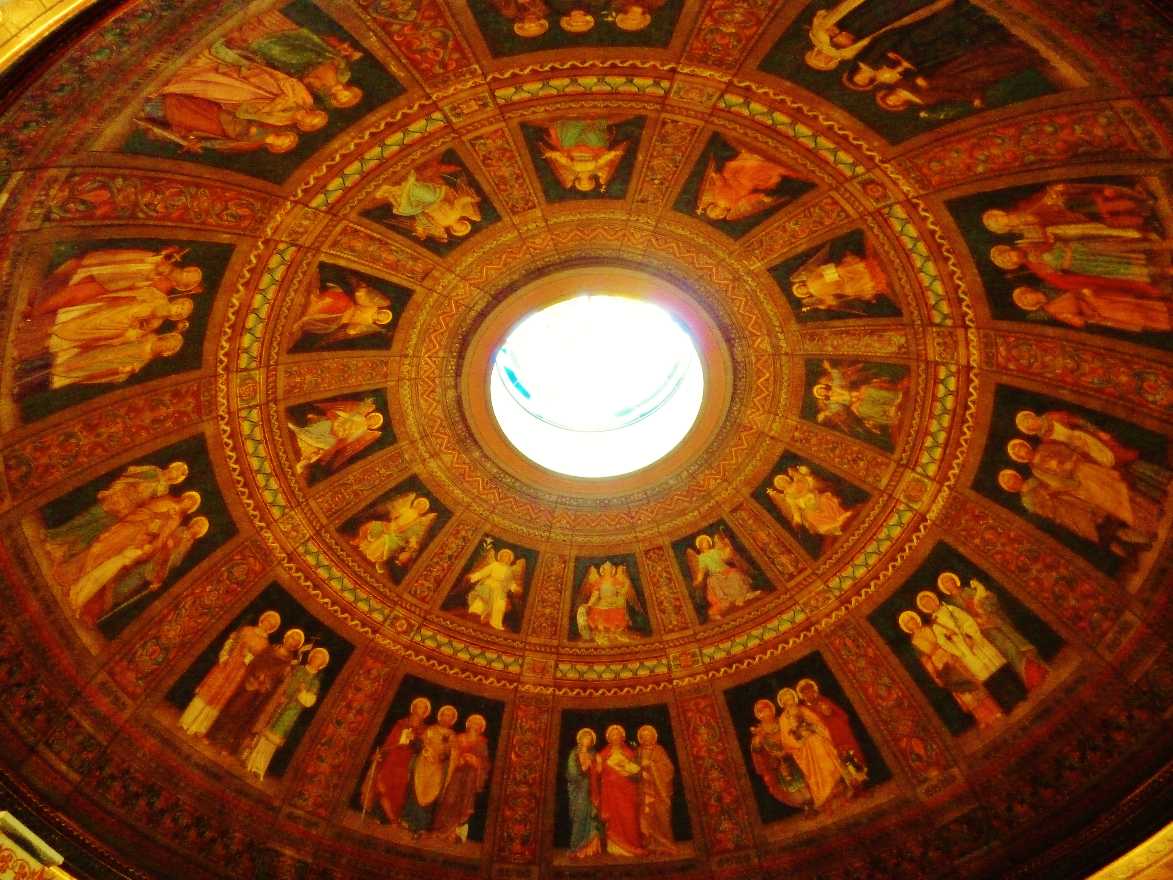 Kuppel der Petruskirche in Gesmold mit Heiligen- und Engelabbildungen